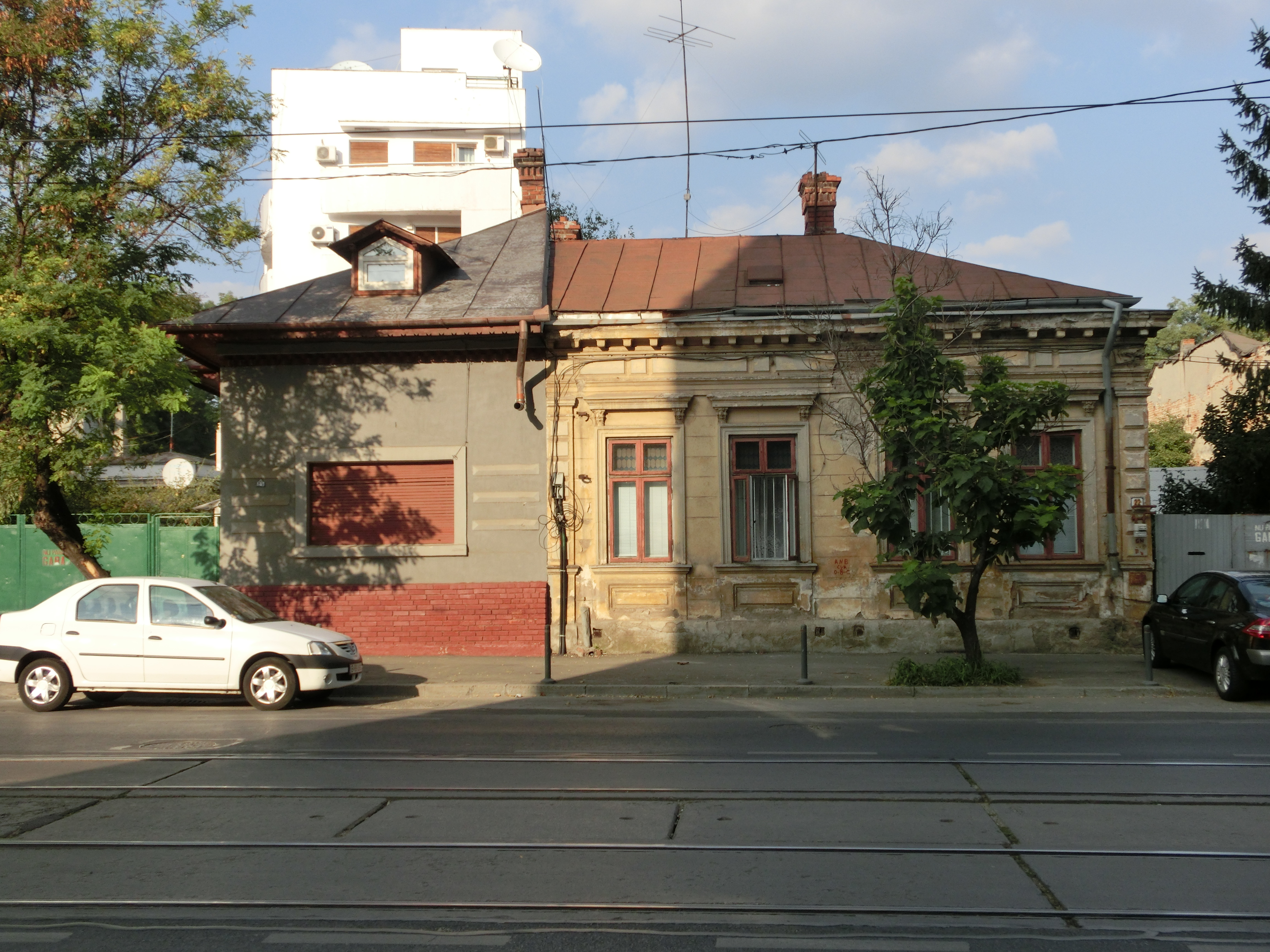 Casa Ion Mihalache 22